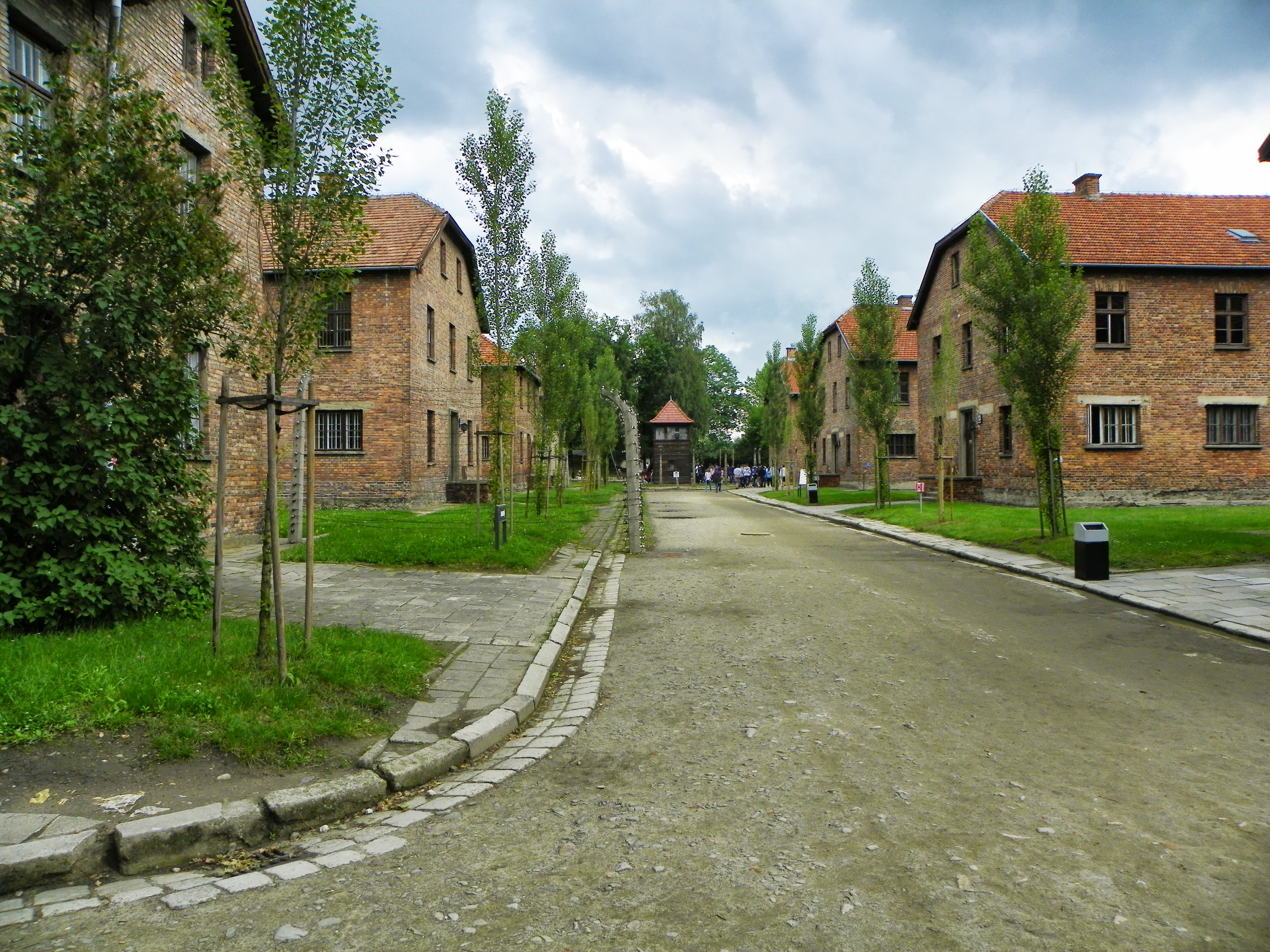 Auschwitz I - Birkenau, Oświęcim, Polonia